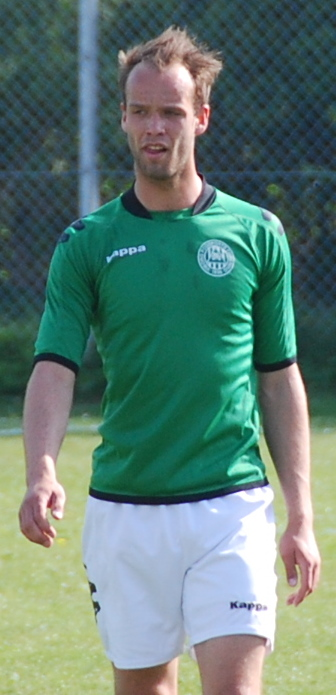 Fodboldspilleren Christian Stisen fra Viborg FF. Her i Jyllandsserie-kampen mod Hobro IK, ved VFF træningsanlæg på Kirkebækvej i Viborg.